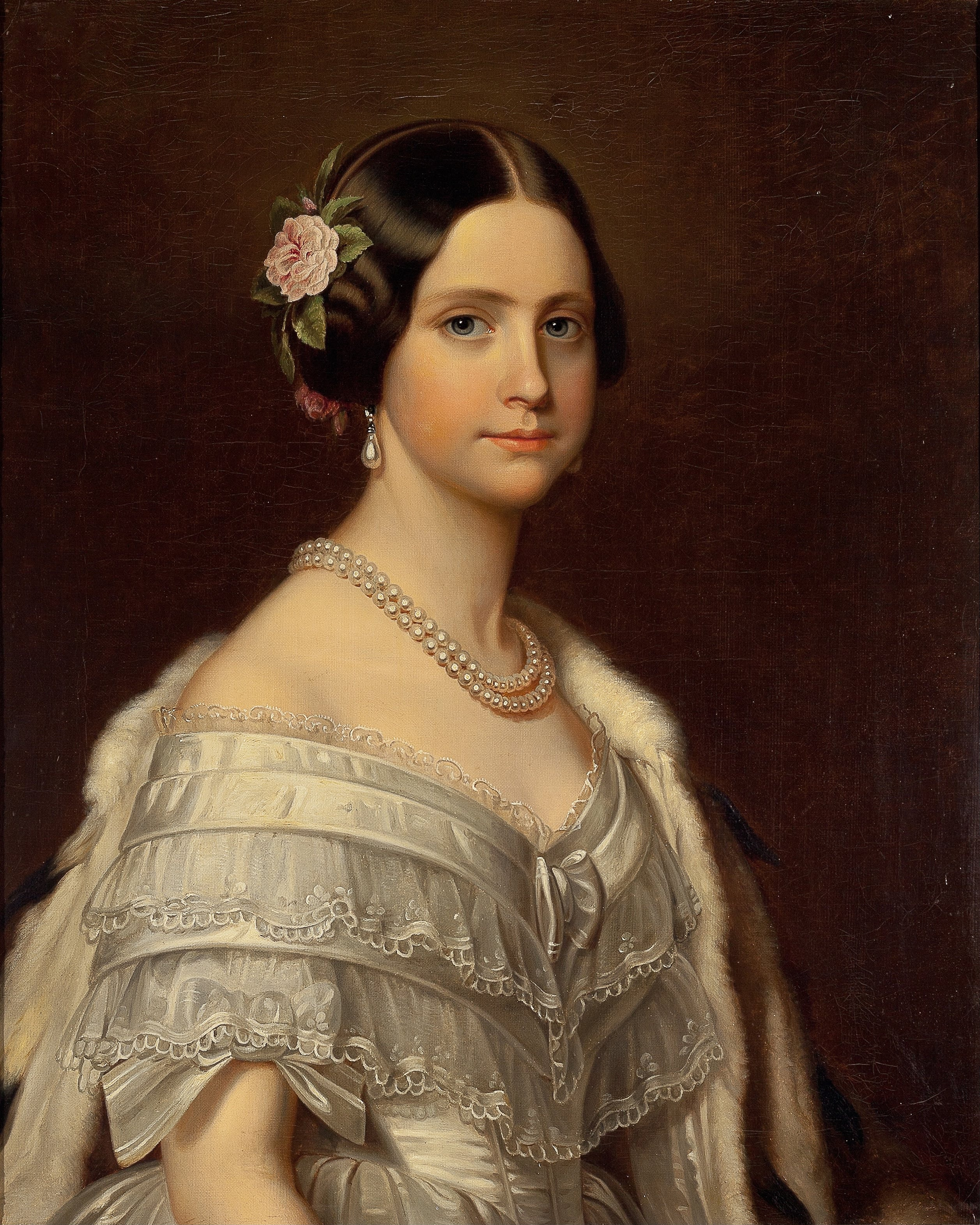 Portrait of D. Amélia Marie Amálie Portugalská Maria Amalia von Portugal Amelia of Brazil マリア・アメリア・デ・ブラガンサ Maria Amélia de Bragança Amelia Augusta di Leuchtenberg